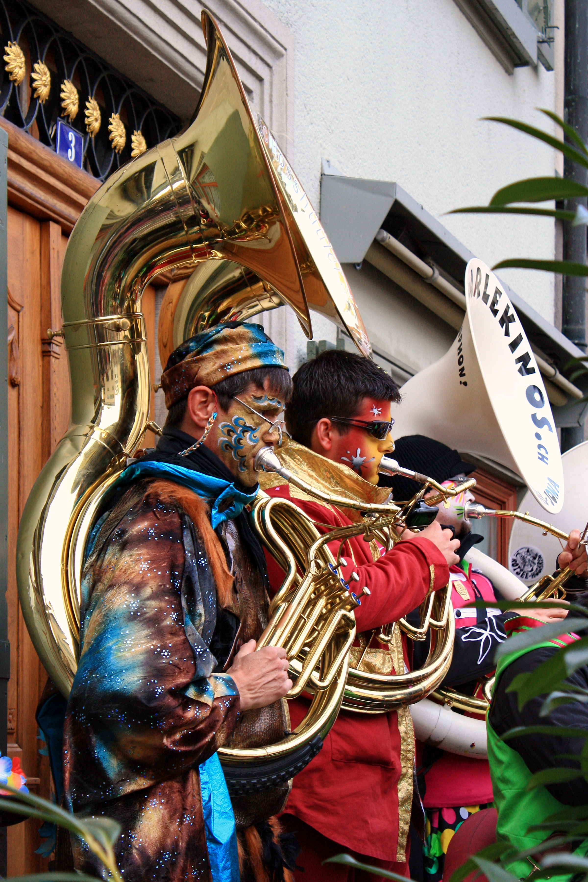 Eis-zwei-Geissebei at Rathaus on Hauptplatz in Rapperswil (Switzerland)